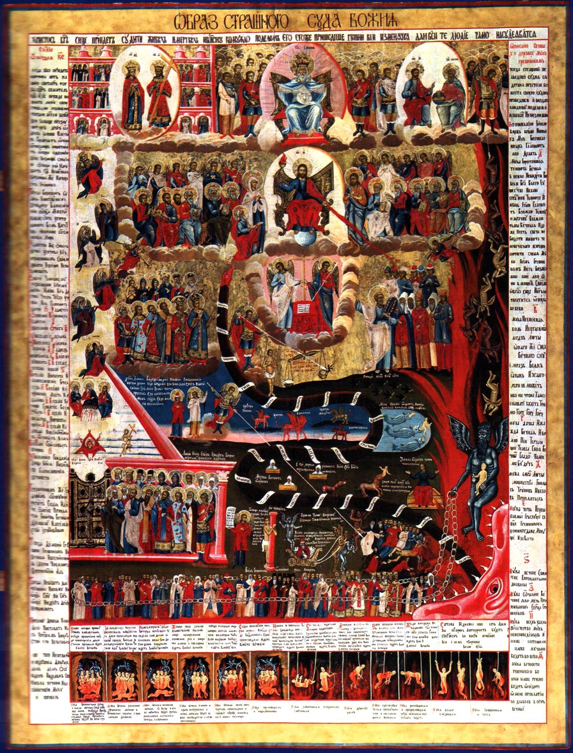 Страшный суд 18 век. Поволжье Дерево, левкас, темпера. 180х137 см. В иконографическом отношении икона типична для XVIII в., особенно для его середины - второй половины. Основные звенья композиции пришли из искусства XVI в. С конца XVII в. становятся популярными такие мотивы иконографии данного памятника, как композиция "Предста Царица" в изображении Горнего Иерусалима, с фигурами Христа и Богоматери в рост, причем Христос держит в руках большой крест; как изображение грешников, связанных одной цепью, которую держит сатана; как изображение пустынной земли с водной гладью вдали. Интересно изображение богача с серебром, в колеснице, запряженной двумя бесами, которыми правит третий бес. Данный вариант Страшного суда сложился под сильным влиянием печатной графики. Из гравюр пришли и многочисленные тексты, и их компоновка, и даже разбивка как бы на отдельные страницы текстов, поясняющих изображения вечных мук и грехи идущих в ад грешников различных сословий. Очень интересны такие детали фольклорного характера, как изображения зверей, рыб и птиц. Икона ярко представляет искусство городских посадов, любимое народом. Исполнивший икону мастер в своей палитре опирался на опыт русской иконописи середины XVIII в. Особенности композиции, а также личное письмо, имеющее гладкую поверхность, с характерными бликами на глазах, передающими их почти "натуральный" блеск, позволяют сузить датировку иконы до 1770-1780 годов. Икона представляет художественную, историко-культурную и музейную ценность/ коллекция русских икон арт-галереи Дежа Вю